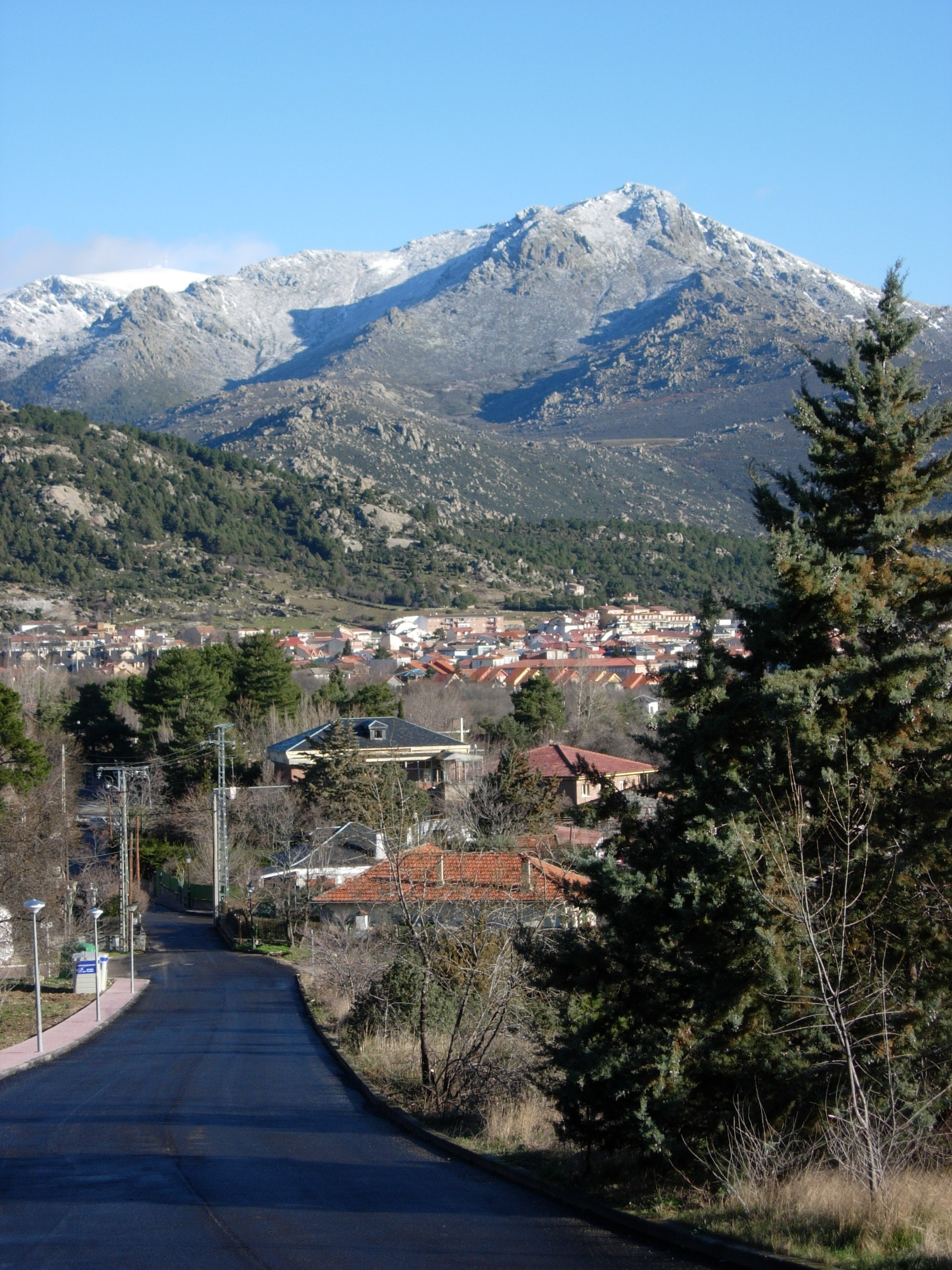 La Maliciosa desde la urbanización Cerro Grande en Becerril de la Sierra. Al fondo a la izquierda y nevada se puede ver la Bola del Mundo.